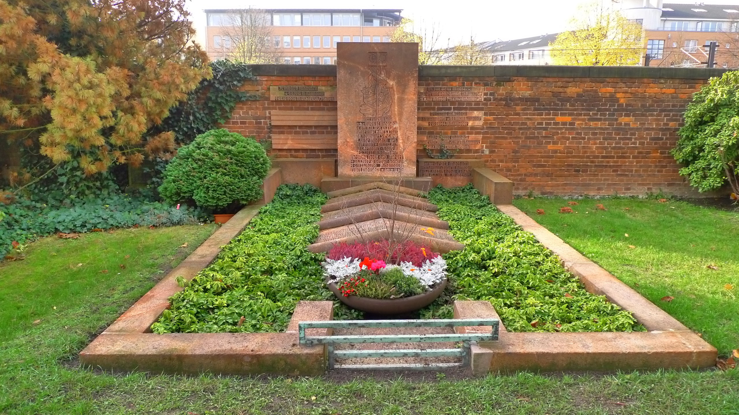 Familiengrab der Verlegerfamilie Madsack auf dem Stöckener Friedhof in Hannover